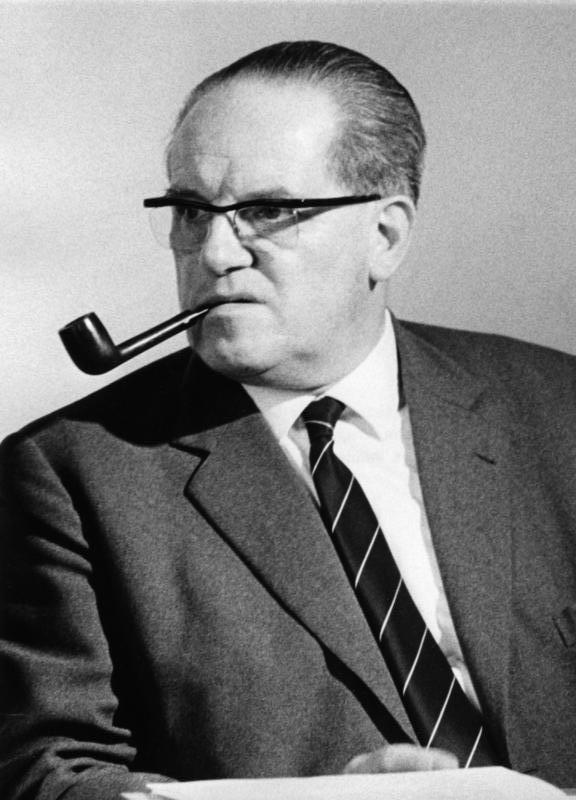 Herbert Wehner Bundesminister für Gesamtdeutsche Fragen Herbert Wehner (Porträt) [Porträt Herbert Wehner mit Pfeife] Abgebildete Personen: Wehner, Herbert: SPD, Bundesminister für gesamtdeutsche Fragen, Vorsitzender der Bundestagsfraktion, Bundesrepublik Deutschland (PND 118629972)